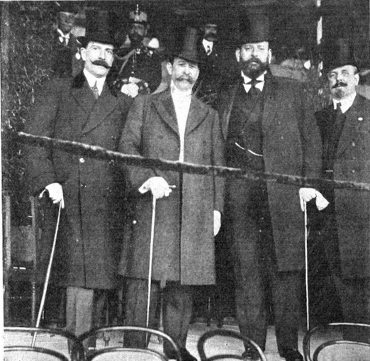 El presidente de Argentina, Figueroa Alcorta junto al Vicepresidente de Chile Figueroa Larrain y el dr. Rodriguez Larreta, en el Club Hipico de Santiago de Chile.